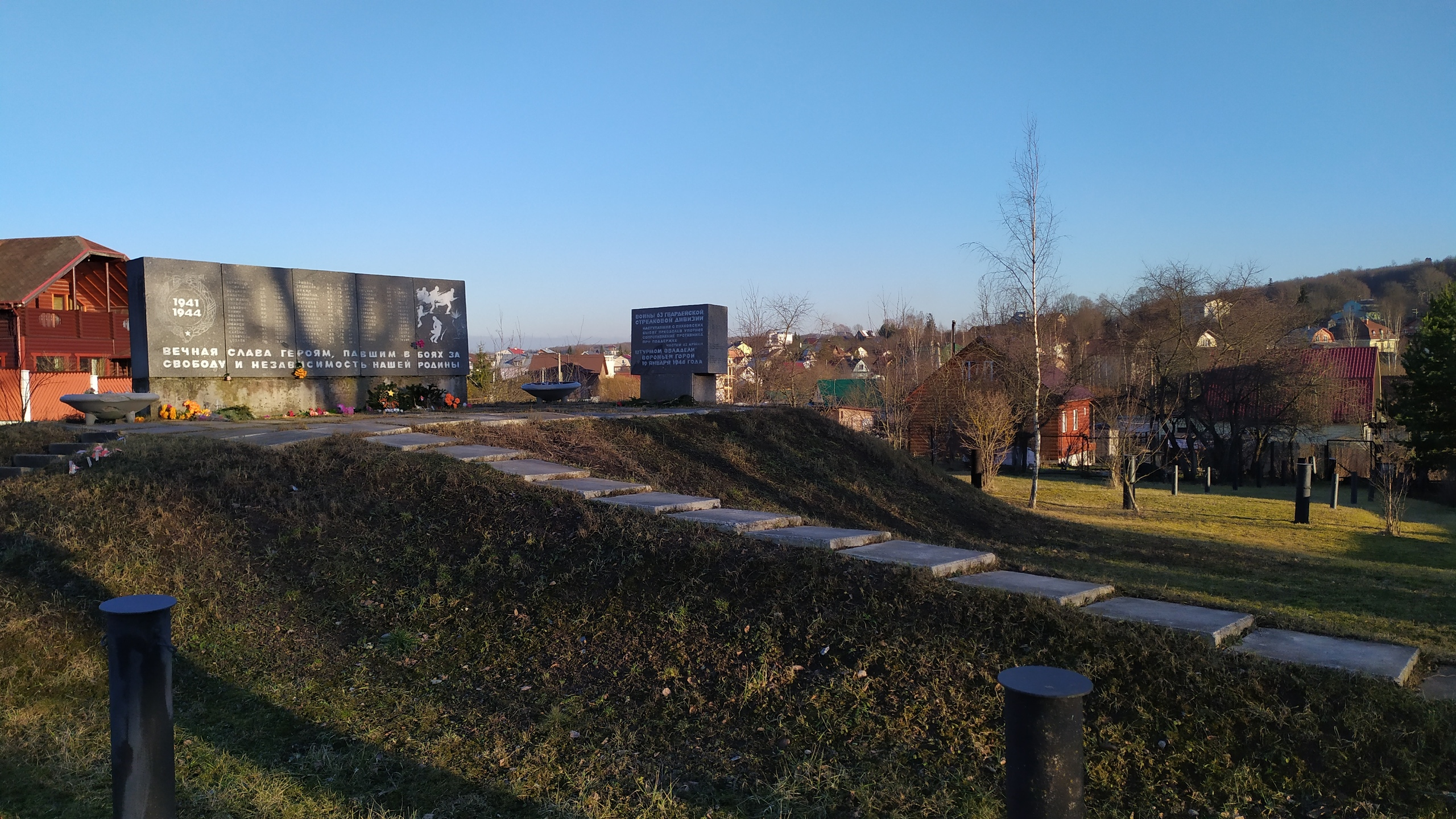 Памятник Штурм в деревне Пикколово